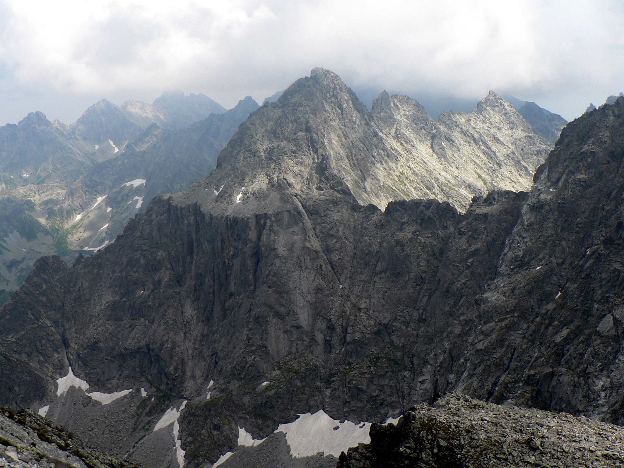 Ganek ze zboczy Rysów